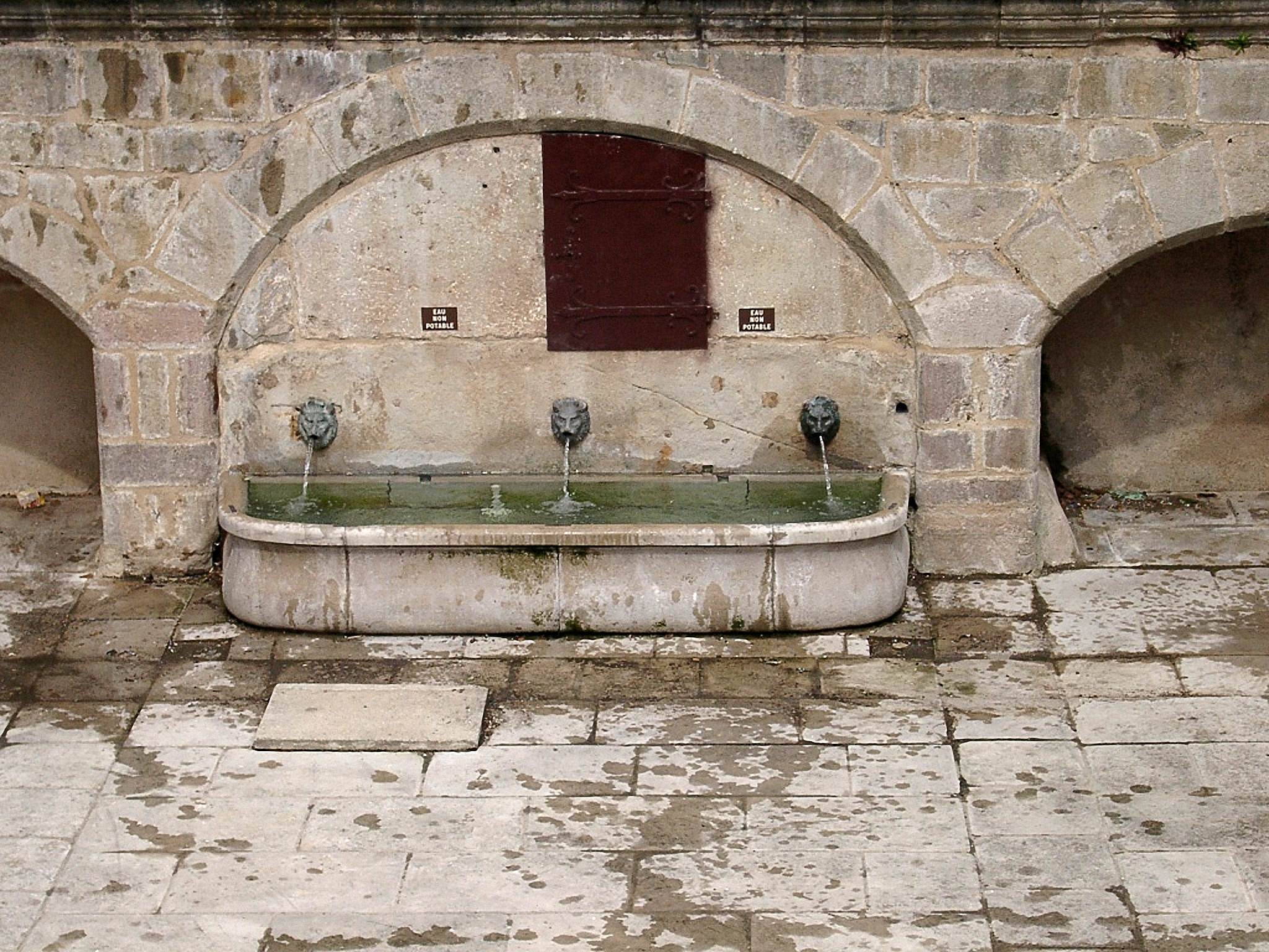 Réalmont (Tarn), Fontaine La Fréjaire